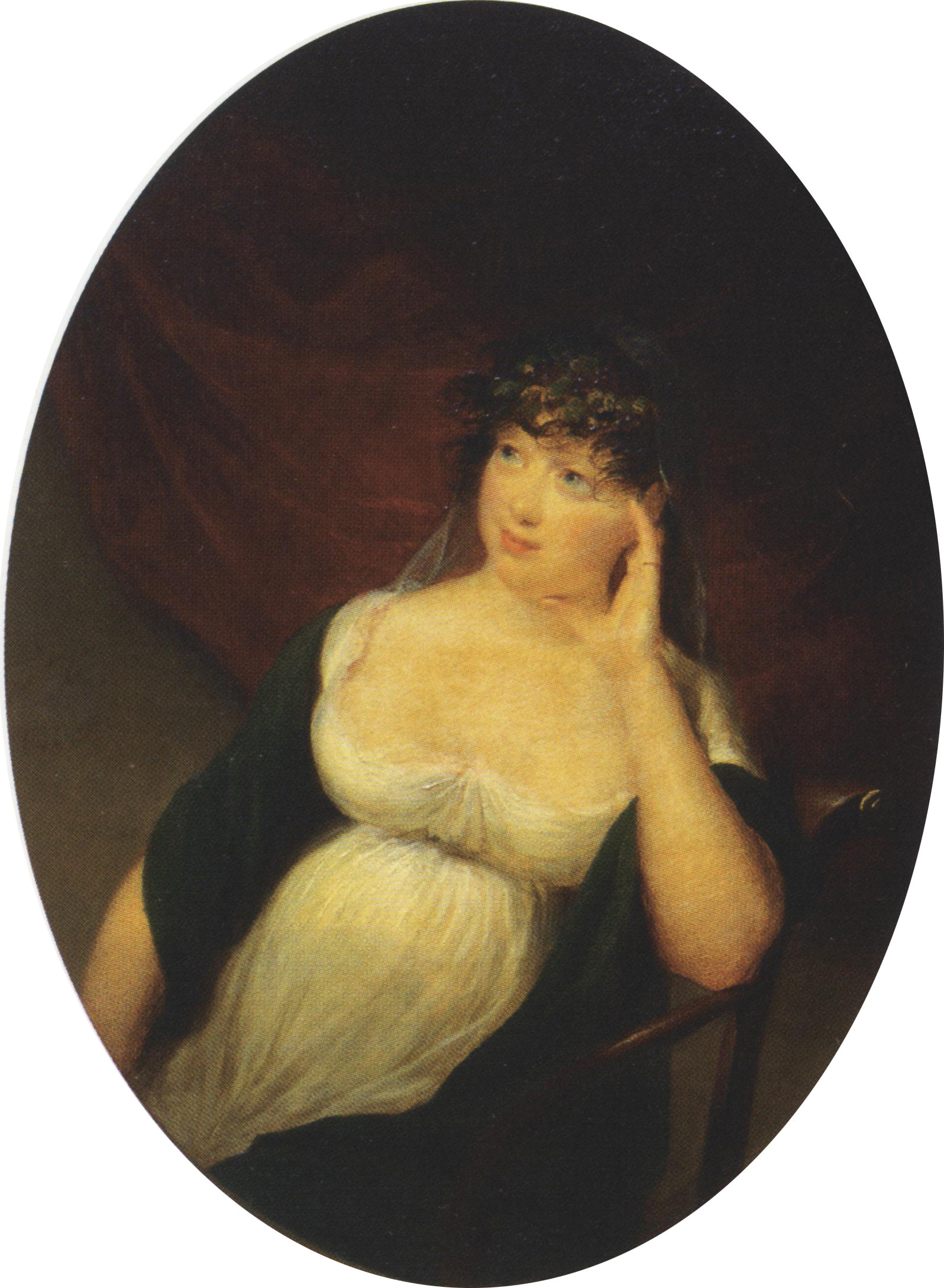 Ф.Г. Фюгер. Портрет вел. кн. Екатерины Павловны. 1805. ГМЗ "Царское Село"